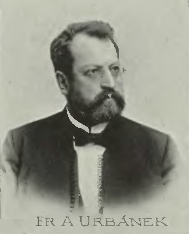 Portrét – František Augustin Urbánek (1842 - 1919), Český hudební nakladatel a knihkupec.